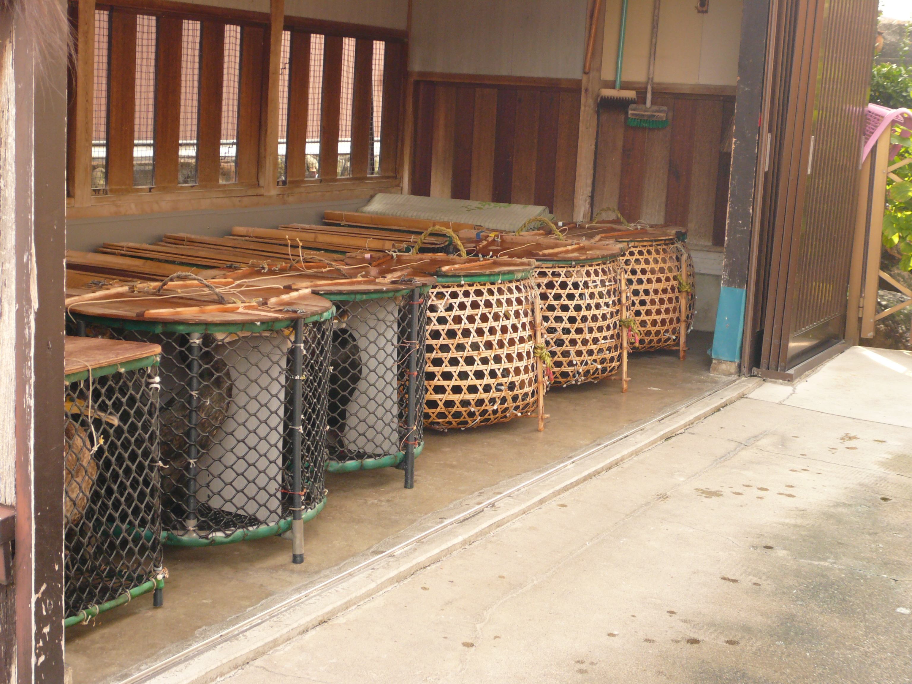 Ukai Nagaragawa（長良川鵜飼）,Gifu,Gifu(岐阜県岐阜市)で撮影。鵜篭に入れられた鵜。鵜匠杉山喜規宅（ヤマジョウ）にて